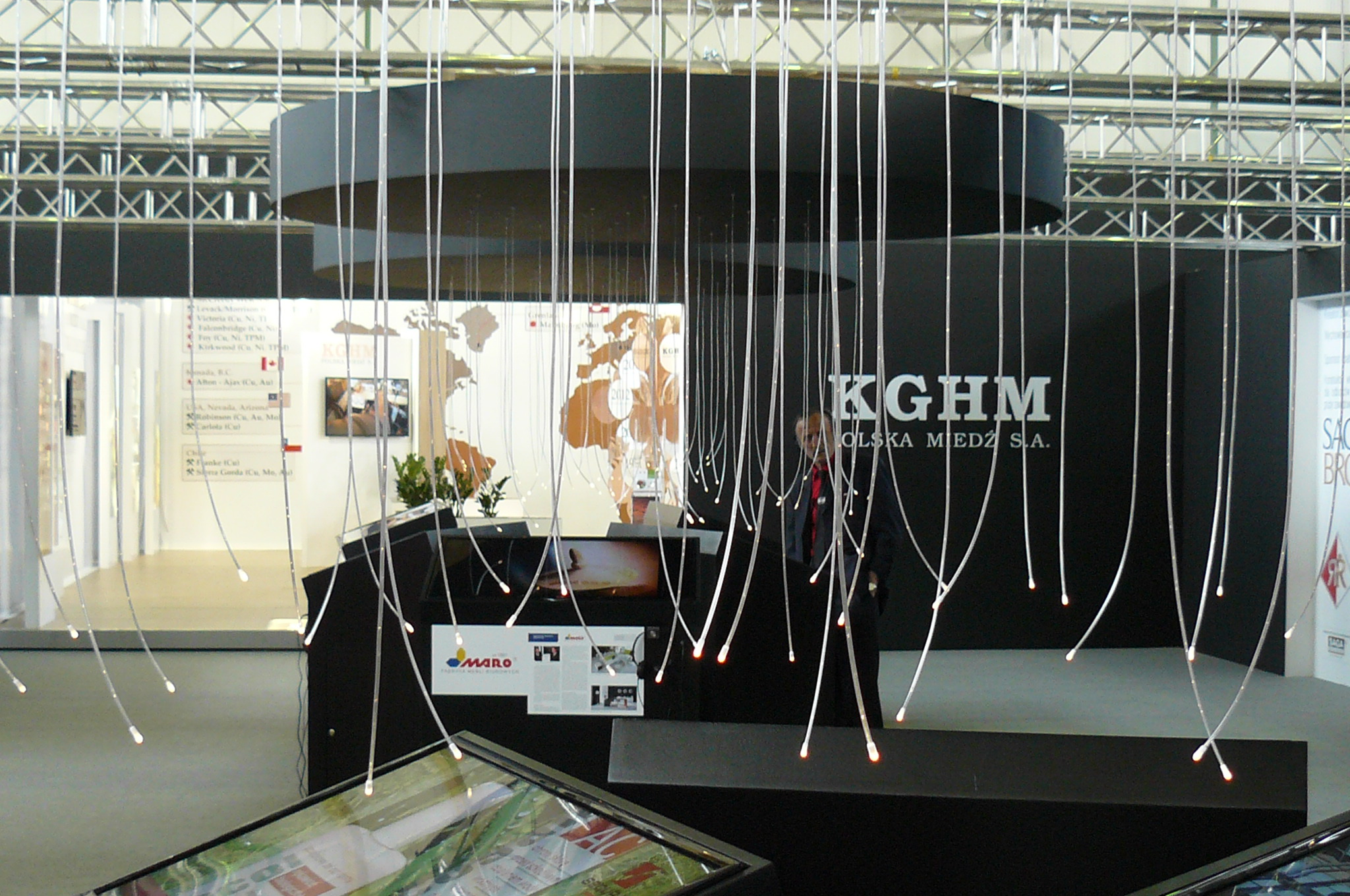 PWK Konkurencyjna Polska w Poznaniu, 2014r.